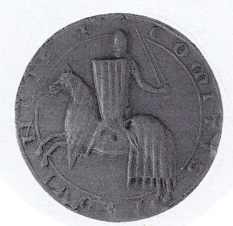 Revers del segell de cera de Ramon Berenguer V de Provença (1209-1245). Representa el seu titular a cavall, pel costat esquerra, amb un escut amb el senyal dels quatre pals, el es repeteix sobre les gualdrapes de la seva montura, i sotén una espasa en alt. La llegenda: +COMITIS / PROVI / NCIE (París, Musée des Archives de France). Montaner Frutos, Alberto; El señal del rey de Aragón, pàg.129